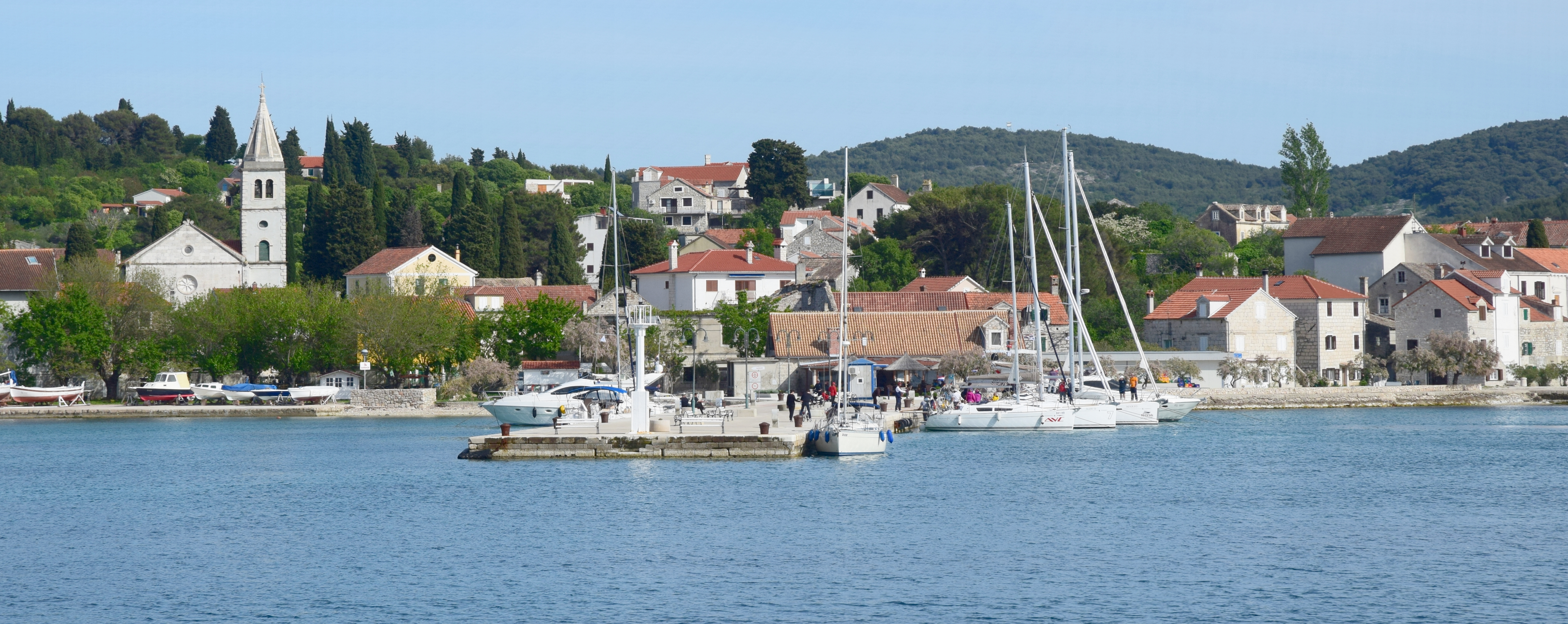 Blick auf Zlarin/Kroatien vom Meer aus